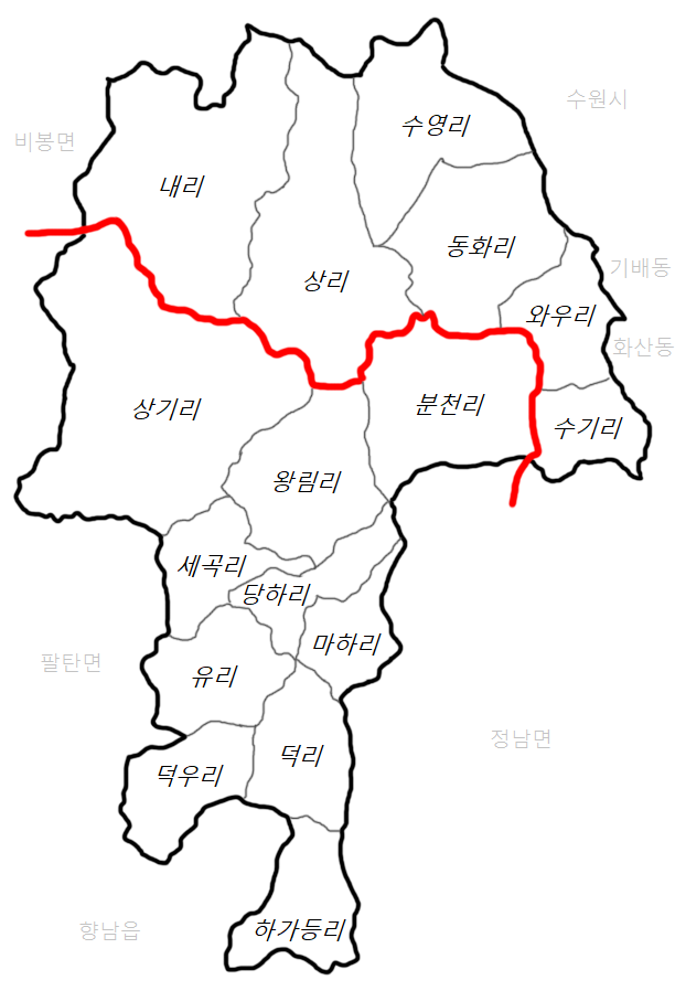 경기도 화성시 봉담읍의 지도